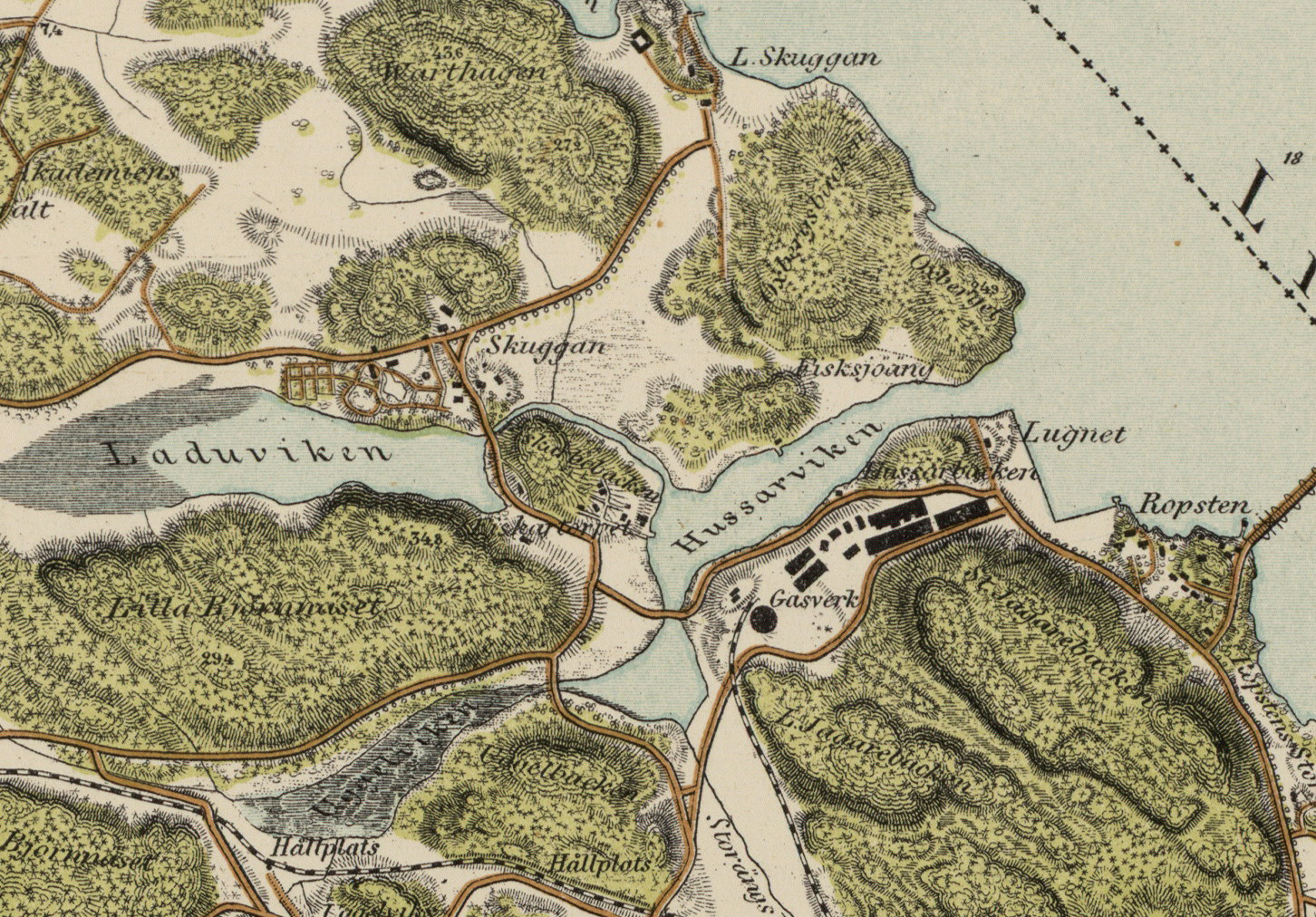 Trakten omkring Stockholm 1861 (blad 5) visande Uggleviken, Laduviken, Husarviken